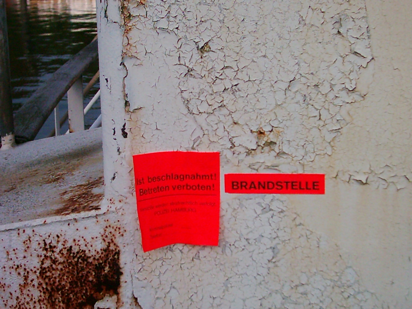 Kennzeichnung beschlagnahmten Materials, hier ein Ausflugsschiff, Polizei Hamburg.